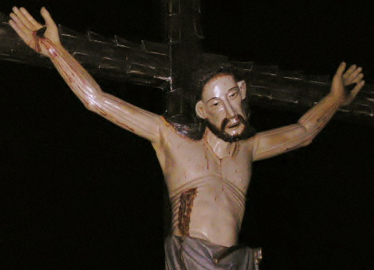 La imagen del Cristo del Espíritu Santo es la más antigua de las que procesionan en la Semana Santa de la ciudad de Zamora (España). La talla representa a Cristo en el momento de morir en la cruz, duodécima estación del Vía Crucis y quinto de los Siete Dolores de María. Se trata de un crucificado gótico, de autor anónimo y fechado a mediados del siglo XIV. El cristo fue encontrado el 14 de mayo de 1963 durante las obras de desencalado de la iglesia del Espíritu Santo. Se encontraba mutilado y emparedado en un nicho del muro sur. Seguramente fue retirado del culto por algún cambio en la estética devocional, además de enterrado o escondido para evitar su destrucción y profanación. Tras la restauración realizada por Julián Román Gonzalo “Alito” y Fernando Núñez Colodrón, fue de nuevo recuperado para el culto. En la actulidad se encuentra situado hacia la mitad del muro norte de la iglesia